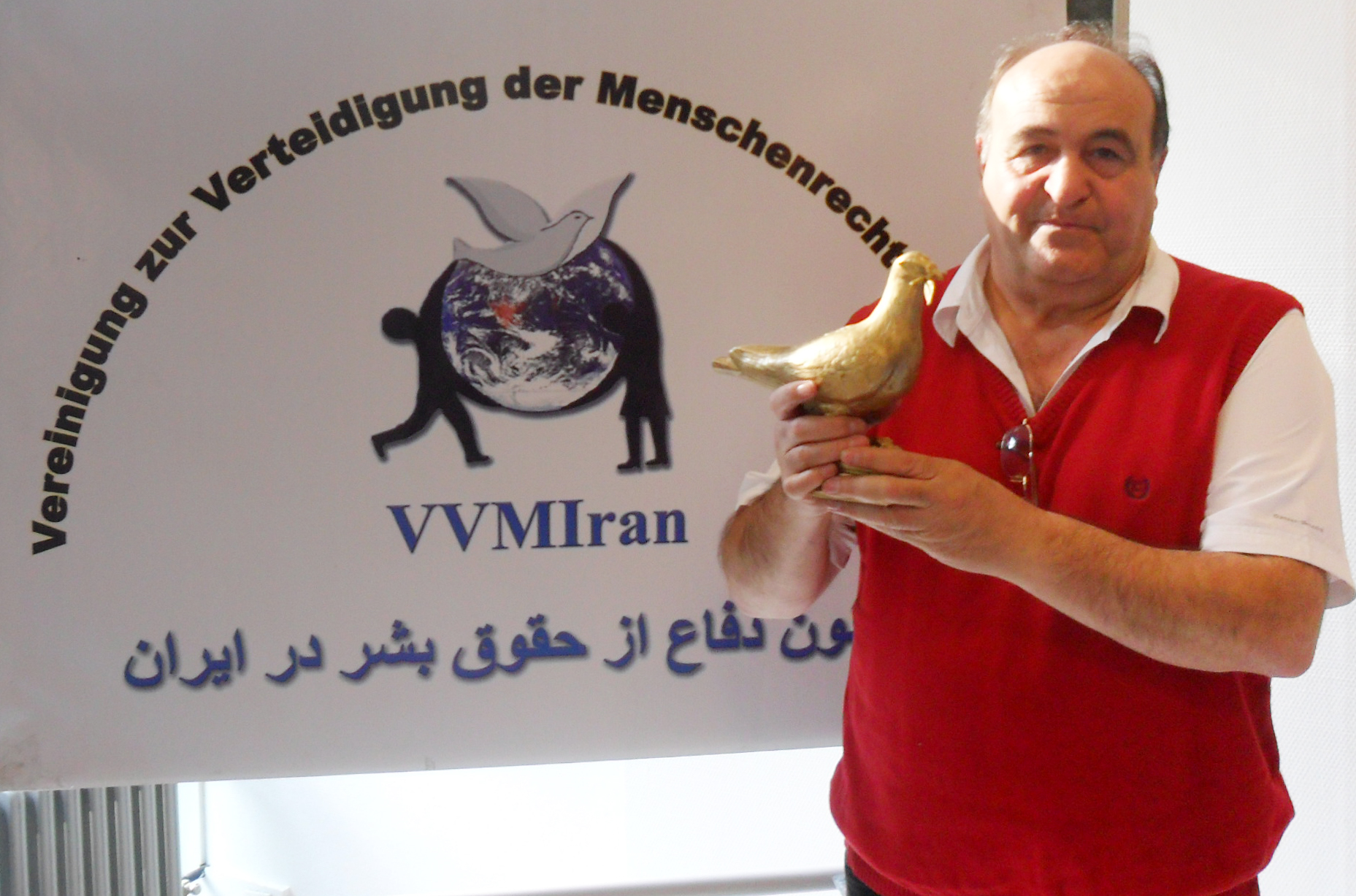 کبوتر جهانی حقوق بشر - منوچهر شفائی